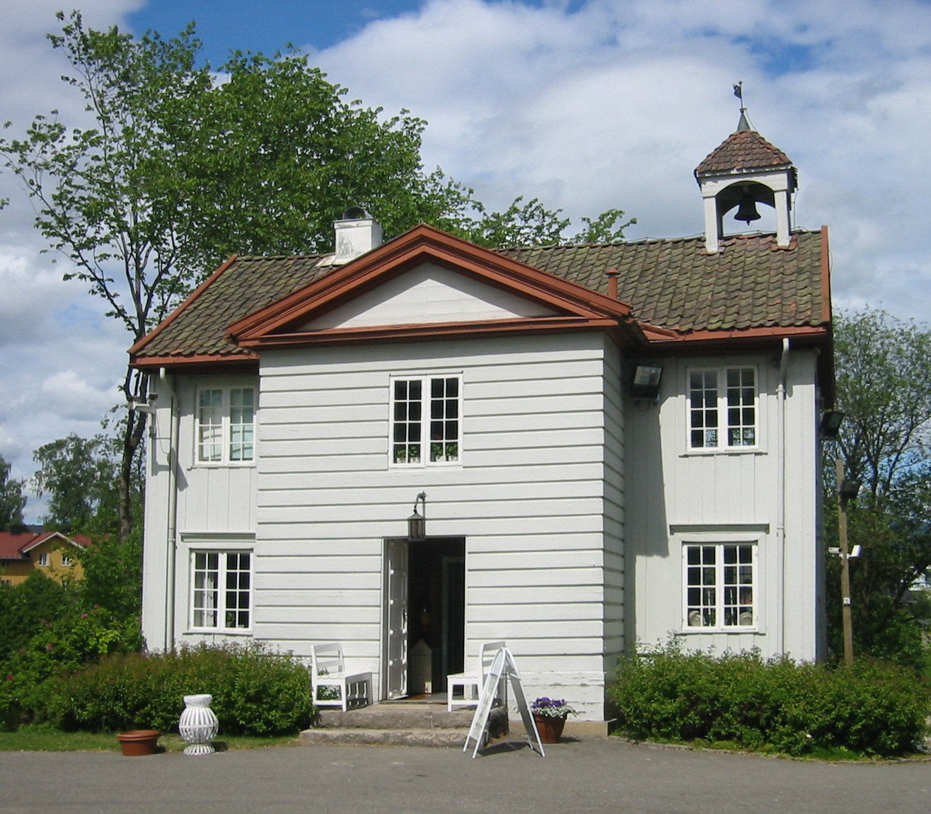 Eidsvoll - nordre pavilion